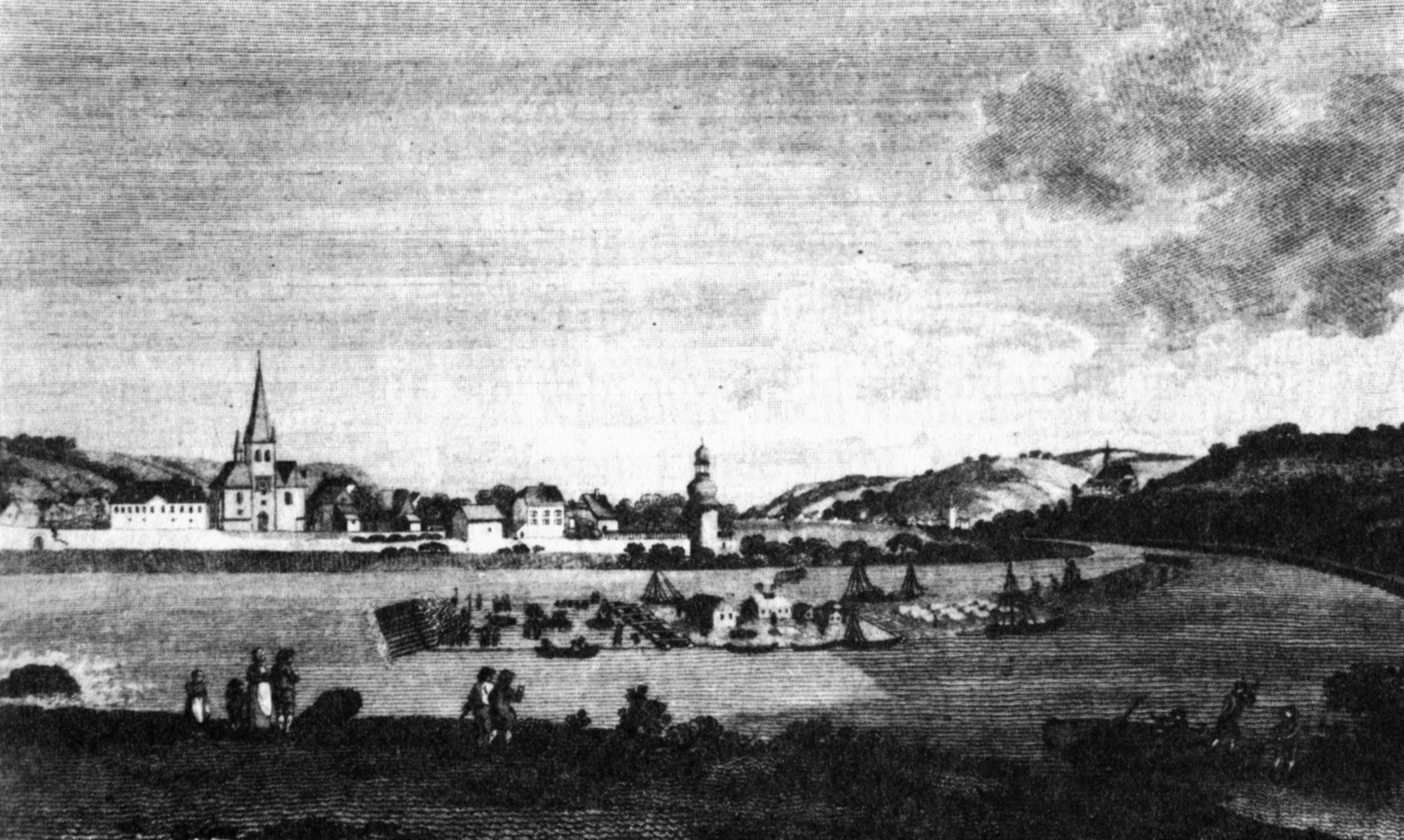 Ansicht Unkels im Jare 1805